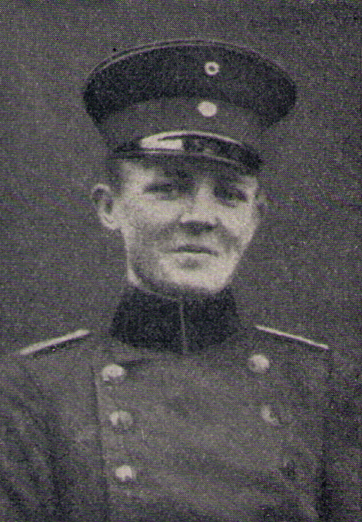 Description Portrait de G. von Forstner, protagoniste de l'Affaire de Saverne.Source Reclams Universum, 30. Jg., Heft 11, S. 578, erschienen am 11. Dezember 1913 ; utilisé dans [1]Author inconnu (non nommé dans la page intégralement reproduite sur la wikipédia allemandePermission(Reusing this file) Bild-PD-alt-1923 Portrait de G. von Forstner, protagoniste de l'Affaire de Saverne.